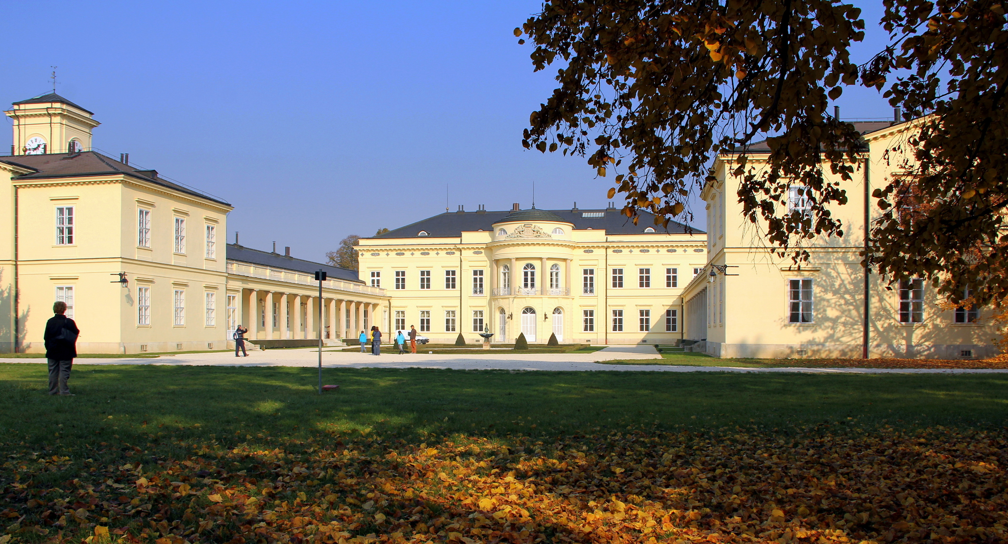 Károlyi-kastély és parkja This is a photo of a monument in Hungary. Identifier: 3637